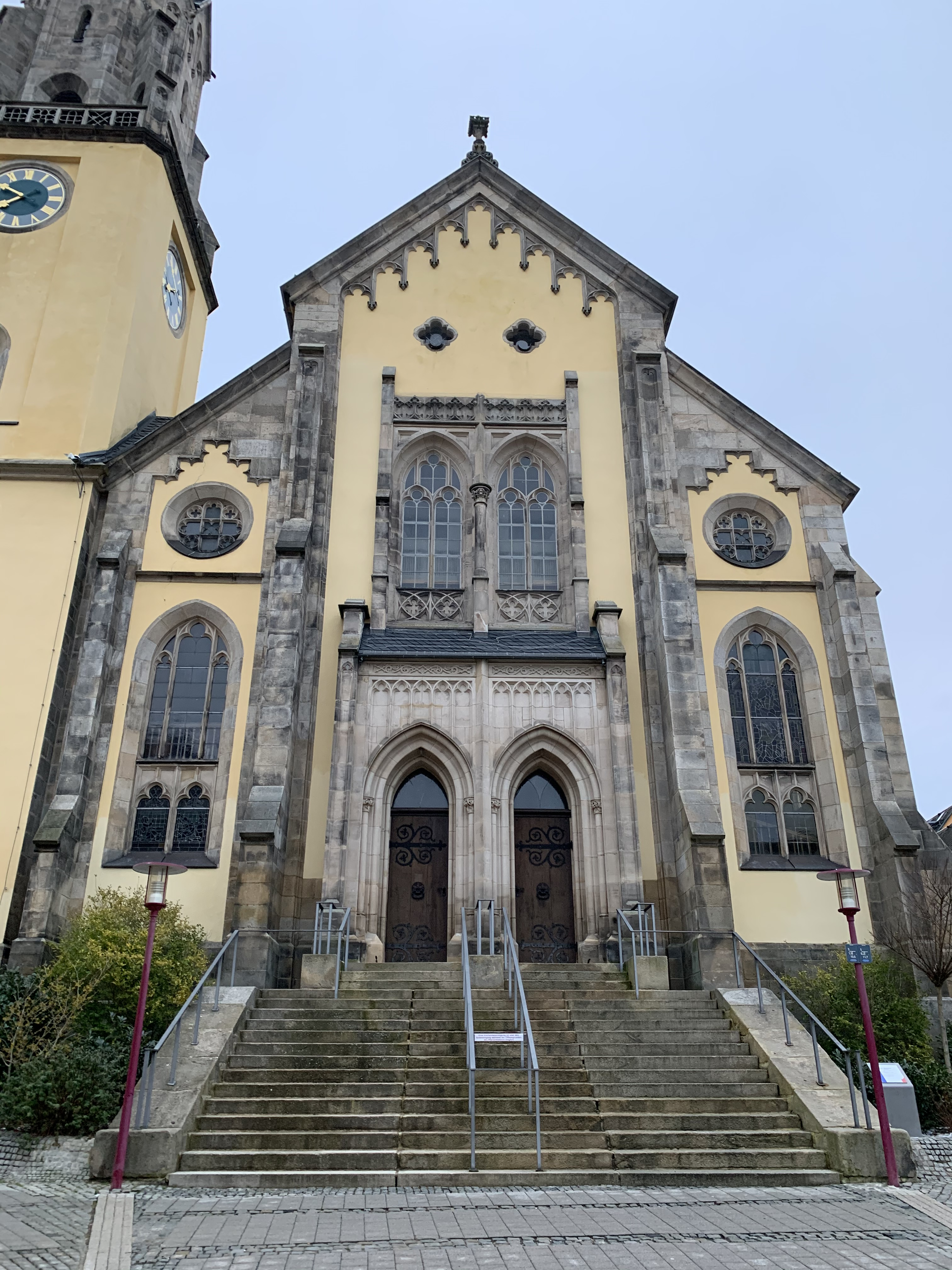 Die Stadtkirche St. Andreas entstand in den Jahren 1859 bis 1863 und befindet sich in Selb im Landkreis Wunsiedel in Bayern.